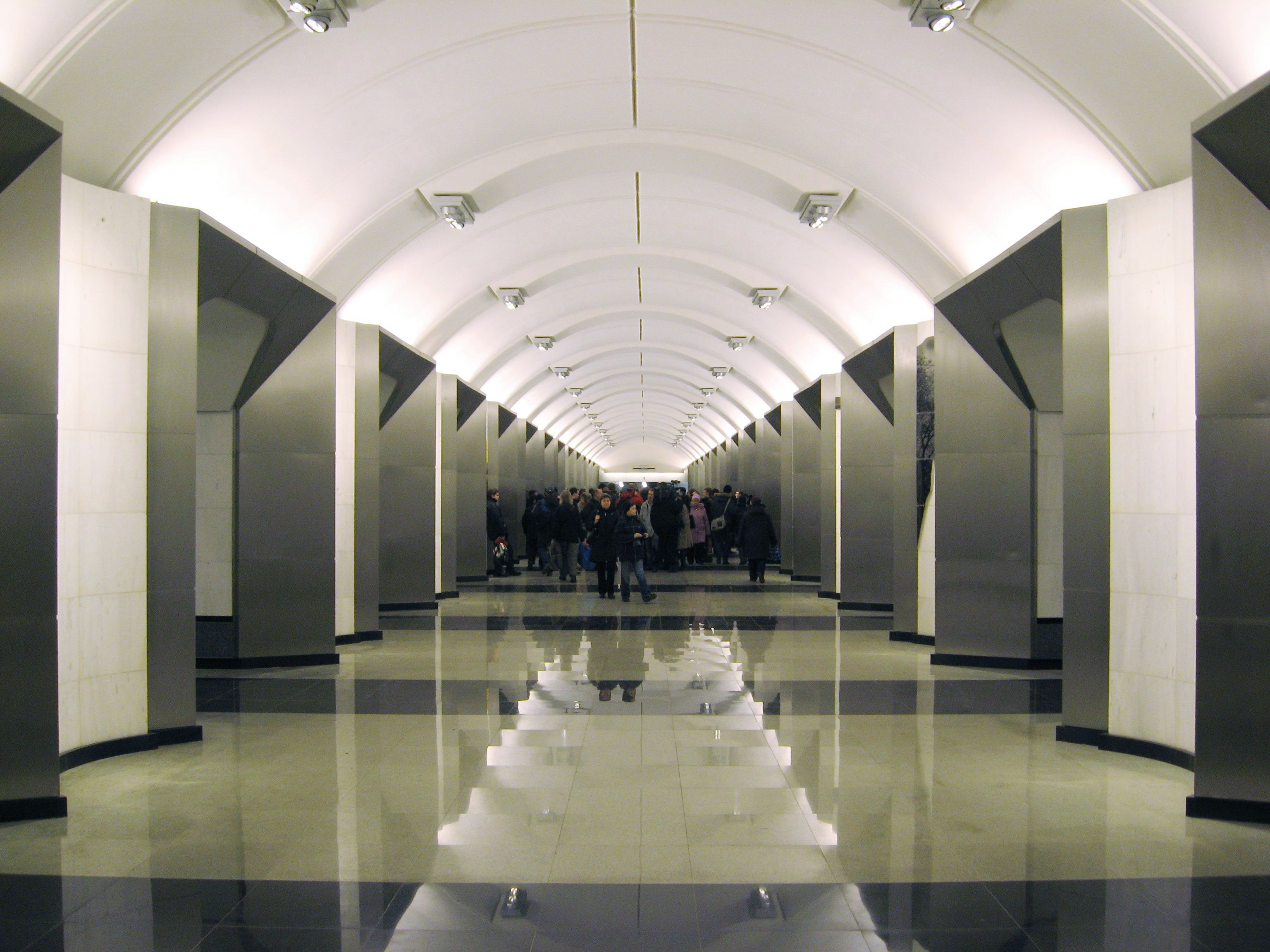 Станция метро "Сретенский бульвар". Color fixedf by Alex Rave